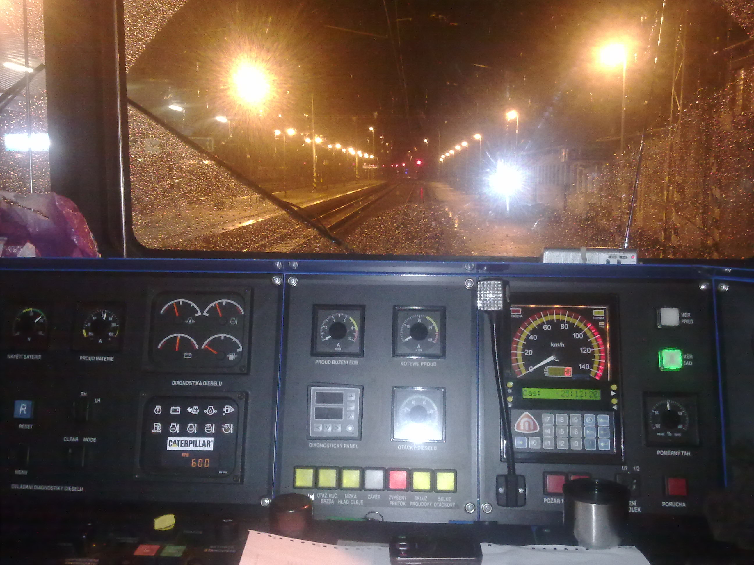 Výhled z lokomotivy AWT řady 753 v žst. Dětmarovice